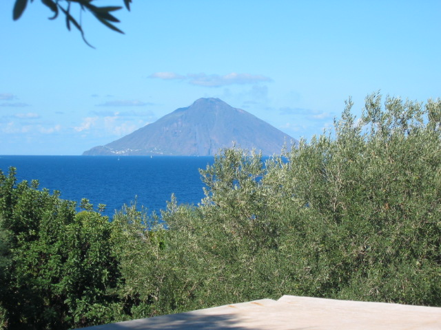 Stromboli